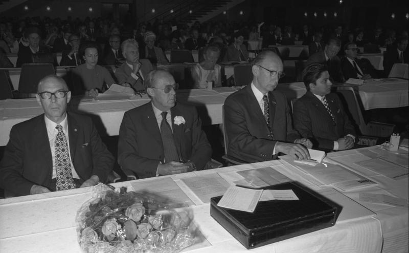 World Wildlife Fund Kongreß in der Beethovenhalle Bonn(2. v. l. Prinz Bernhard der Niederlande)[außen rechts Prinz Gyanendra von Nepal]